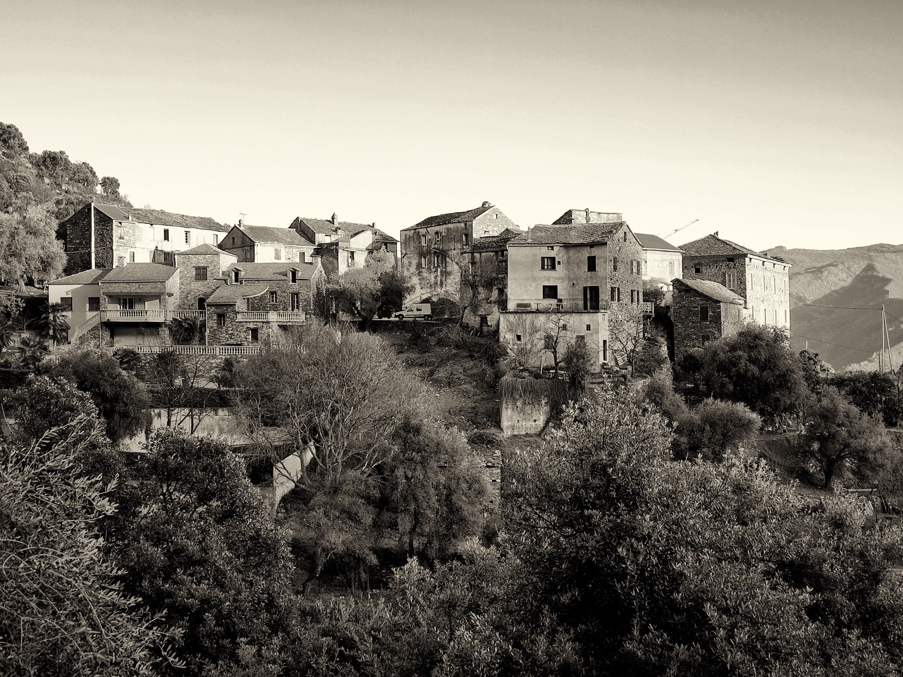 Volpajola, Costera (Corse) - Hameau de Quarcettu, au sud de Trave et au sud-est du village